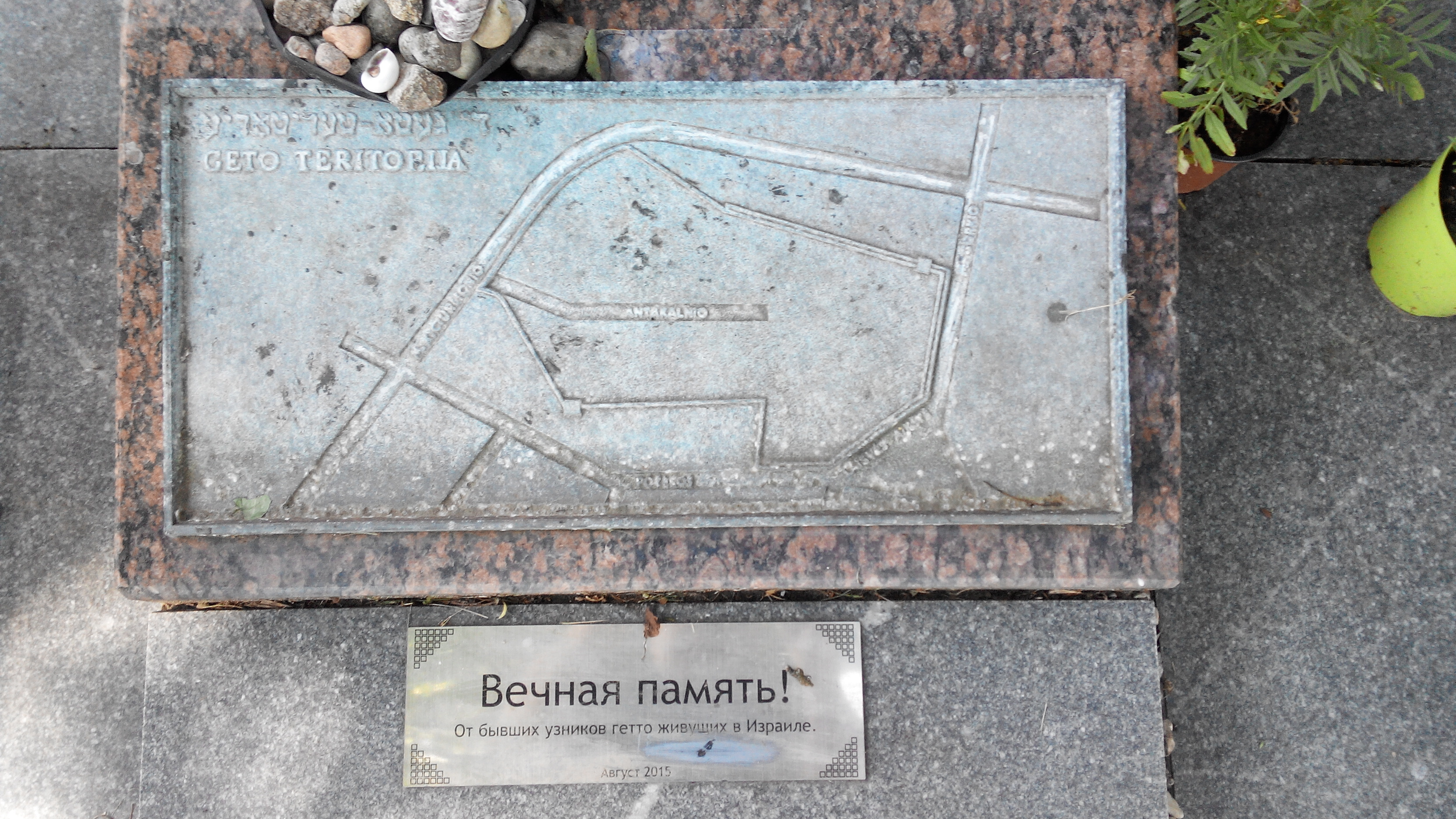 Памятник евреям - узникам гетто в Друскининкае (Литва) в 1941-1943 годах. Находится в Друскининкае на улице Св. Якова (Šv. Jokūbo) около дома № 24.